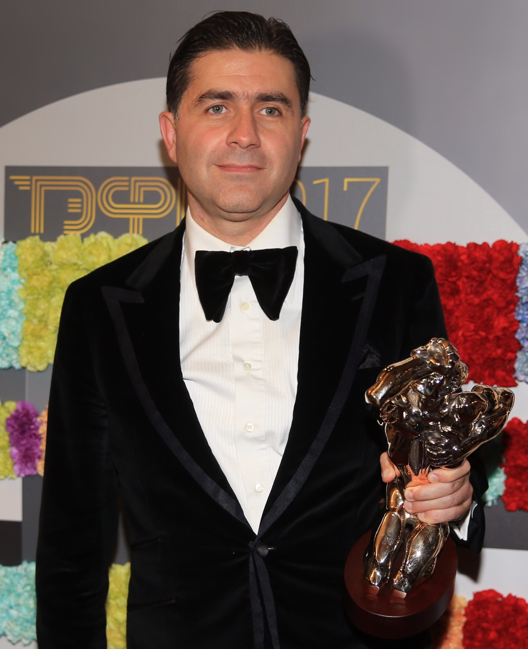 Артур Джанибекян на «ТЭФИ-2017»